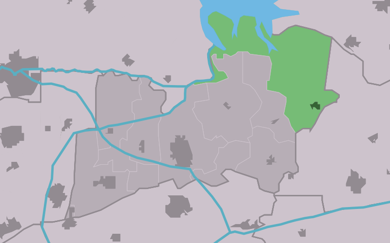 Kaartsje fan himrik fan Muntsjesyl